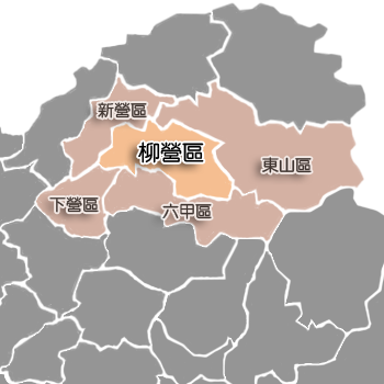 柳營區相對位置